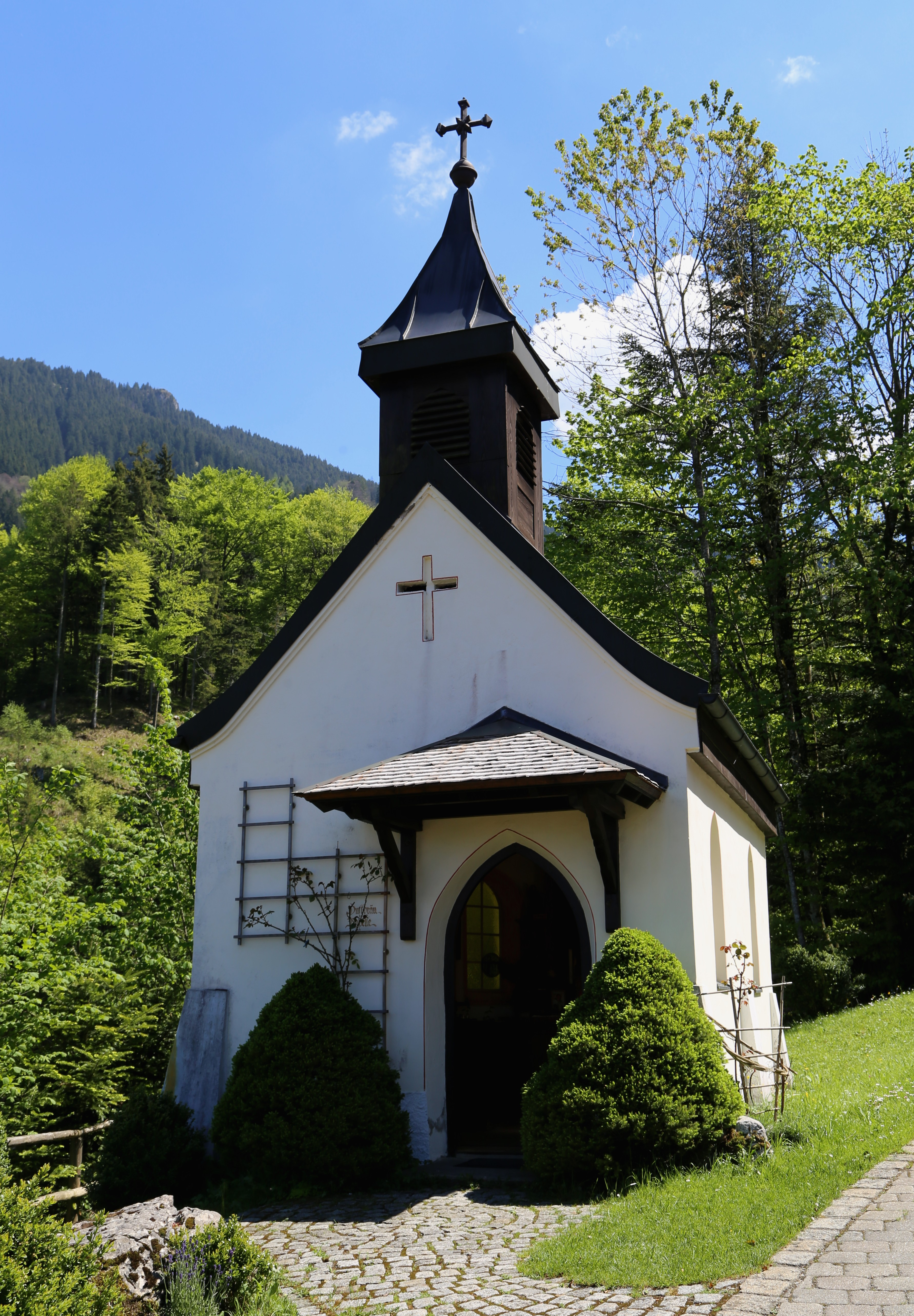 Duft 1, Samerberg; Duftbräukapelle, 1930; mit Ausstattung